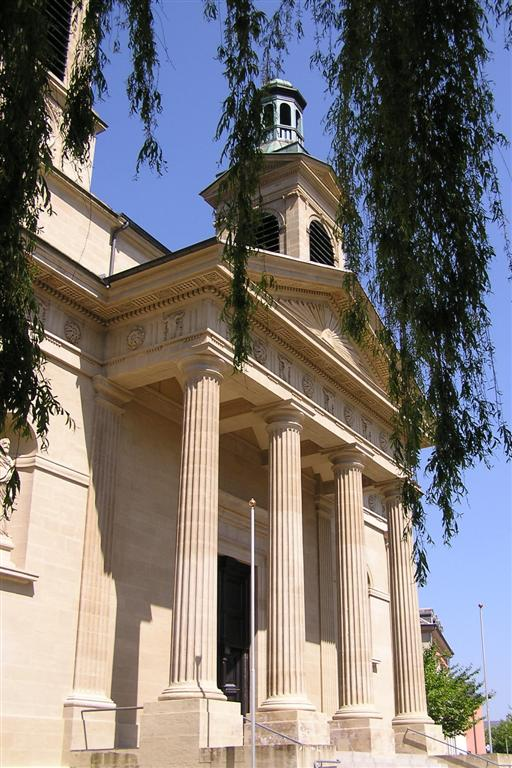 L'église de Mersch (Luxembourg)